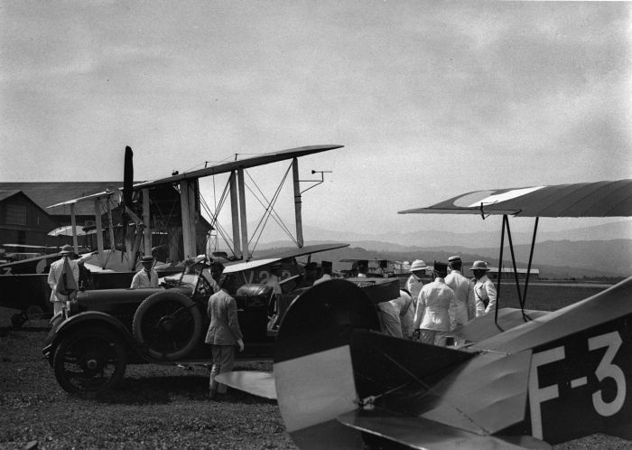 Foto. Gouverneur-generaal mr. D. Fock in gesprek met de commandant op het vliegveld van Kalidjati, West-Java, tijdens zijn tweedaags bezoek aan de Pamanoekan- en Tjiasemlanden in oktober 1922.